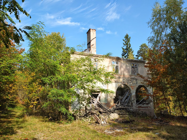 Rudziska Pasymskie - pozostałości po budynku Mazurskiego Uniwersytetu Ludowego